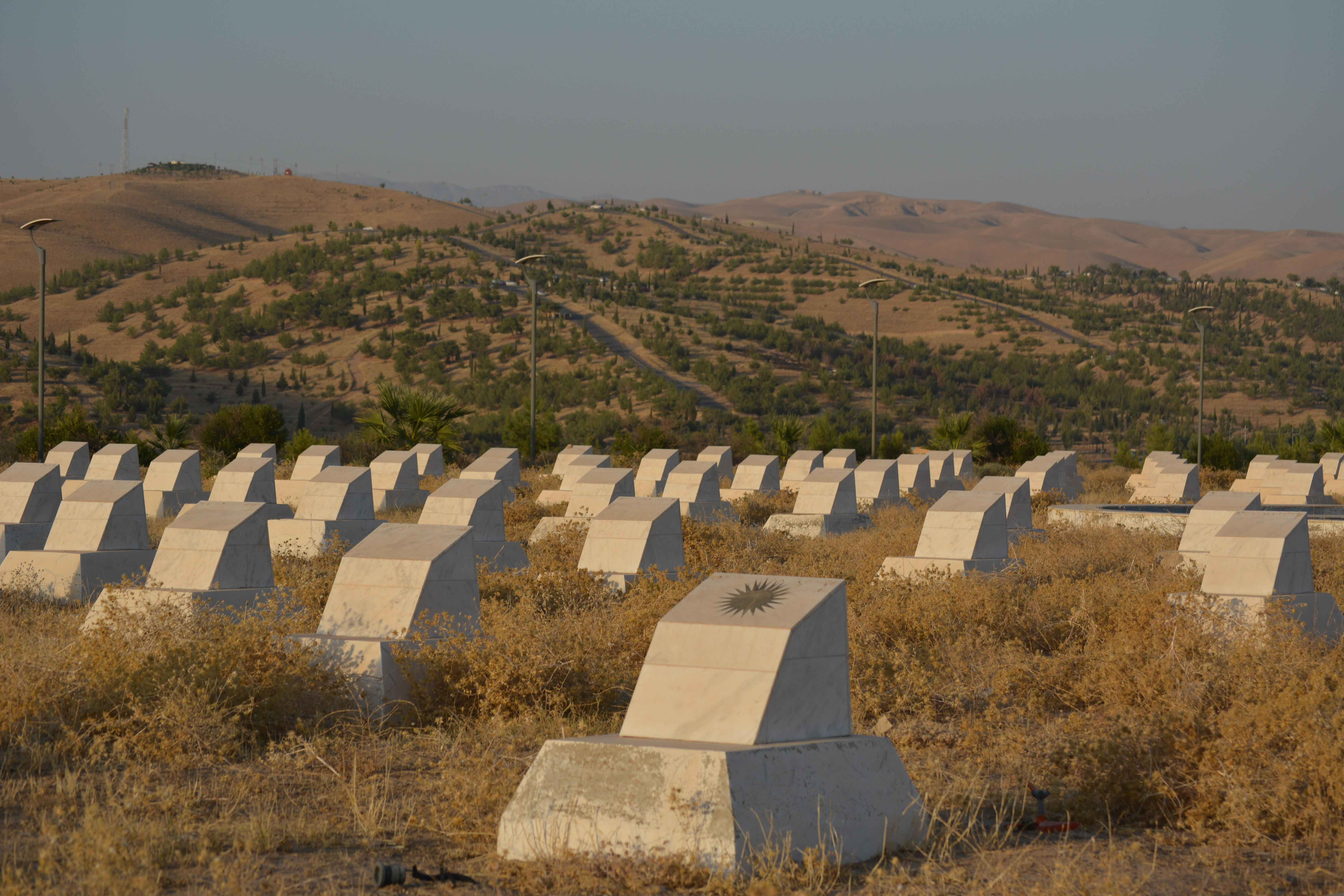 نحت الفنان والمعماري الكردي خسرو الجاف تحفة معمارية وفنية ترمز إلى شهداء الثورة الكردية ويقوم فوق أرض مساحتها 25 دونما بتكلفة تقترب من 19 مليون دولار وتم البدأ ببنائه في سنة 2010 وتم الانتهاء منه في سنة 2012.